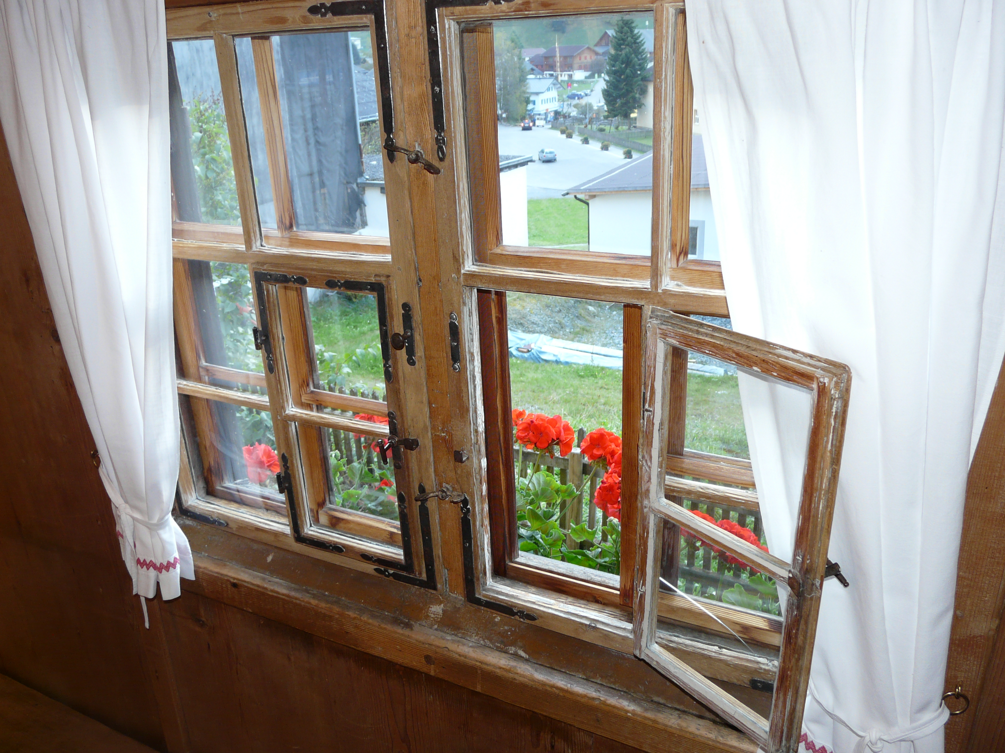 Bildinhalt: Fenster im Tourismusmuseum in Gaschurn Aufnahmeort: Gaschurn, Montafon, Österreich